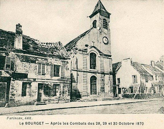 Carte postale ancienne éditée par Farineau Le Bourget, après les combats des 28, 29 et 30 octobre 1870